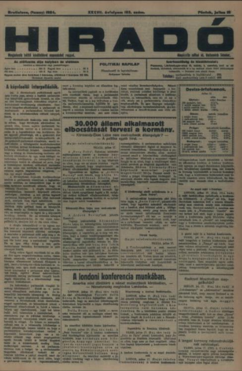 Titulný list denníka Hiradó.